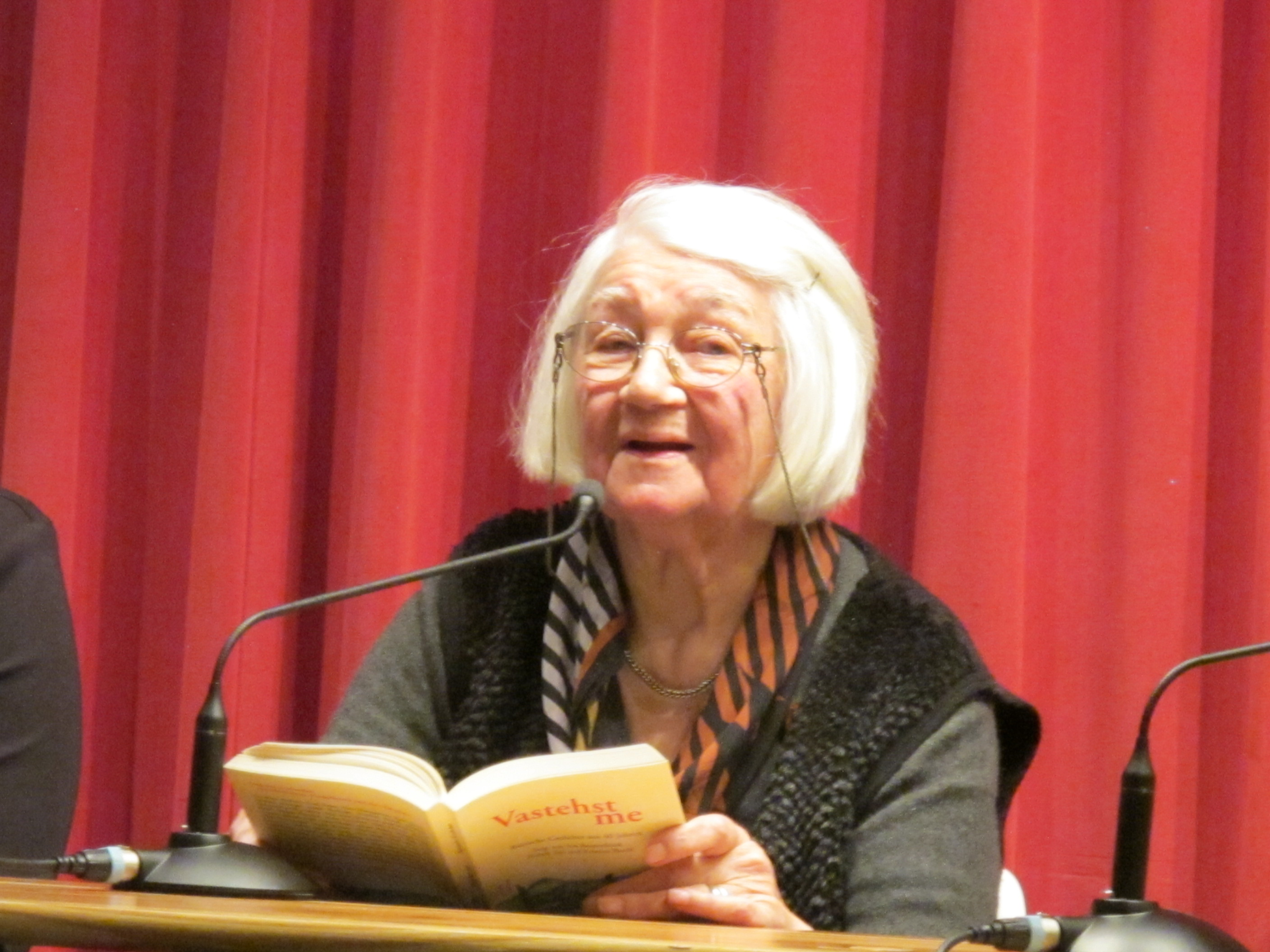 Lesung Lichtung Verlag Januar 2015 im Lyrik Kabinett, Margret Hölle